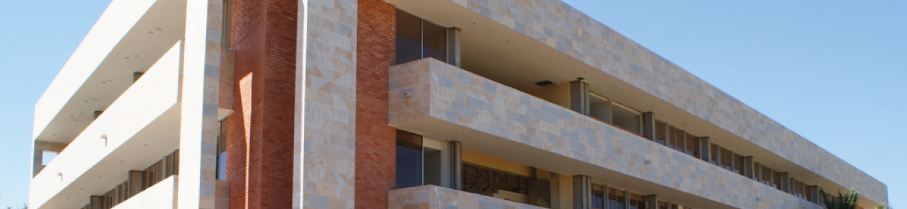 Vista superior del edificio de la sede de Areandina en Valledupar.